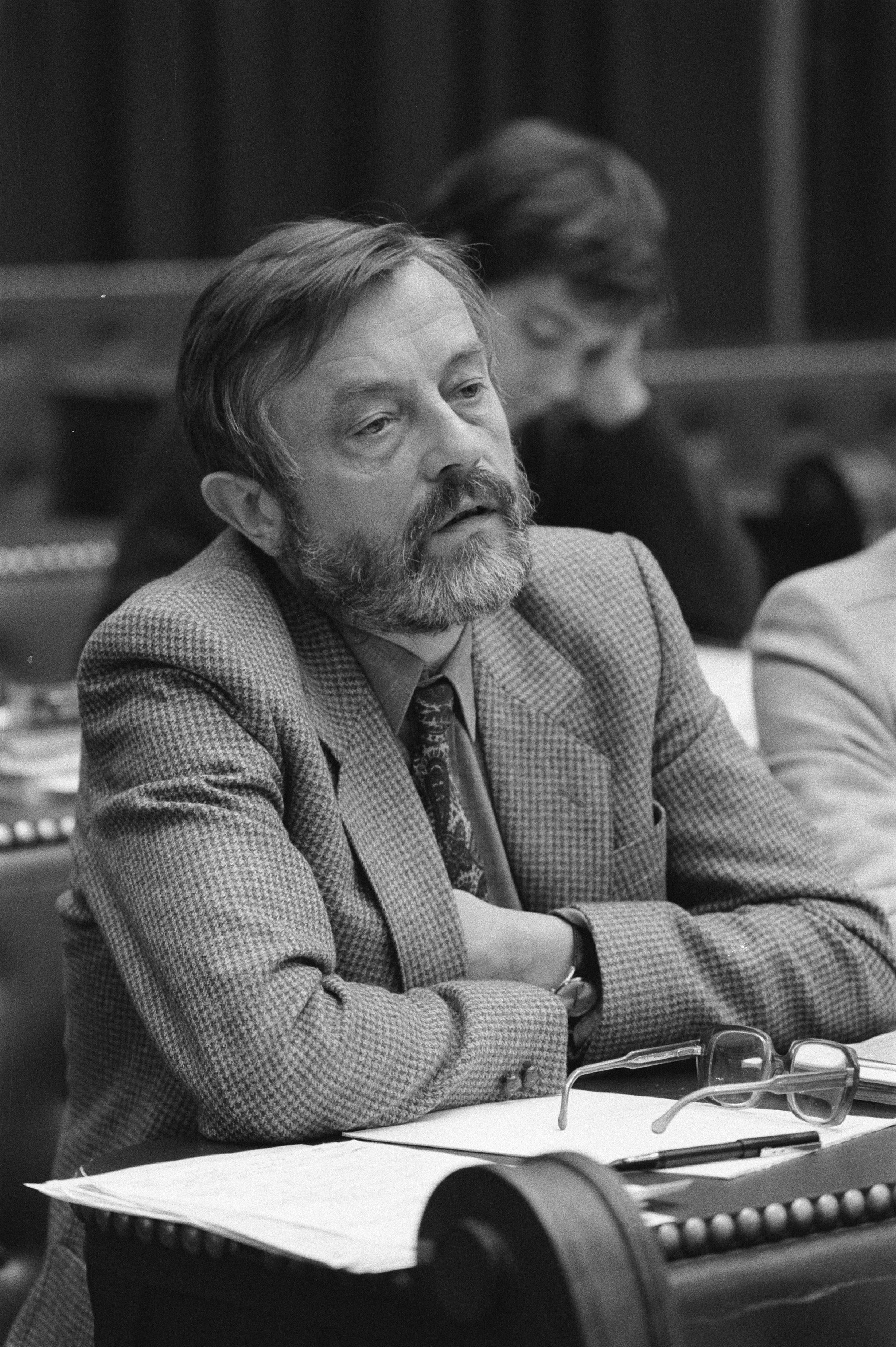 Collectie / Archief : Fotocollectie Anefo Reportage / Serie : [ onbekend ] Beschrijving : Voorzitter Nationale Commissie voorlichting en bewustwording Ontwikkelingssamenwerking (NCO), Dolf Coppes Datum : 14 juni 1982 Locatie : Den Haag, Zuid-Holland Trefwoorden : commissies, parlementariërs, politiek, voorzitters Persoonsnaam : Coppes, Dolf Fotograaf : Dijk, Hans van / Anefo Auteursrechthebbende : Nationaal Archief Materiaalsoort : Negatief (zwart/wit) Nummer archiefinventaris : bekijk toegang 2.24.01.05 Bestanddeelnummer : 932-2107